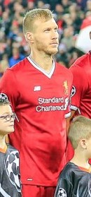 Liverpool FC